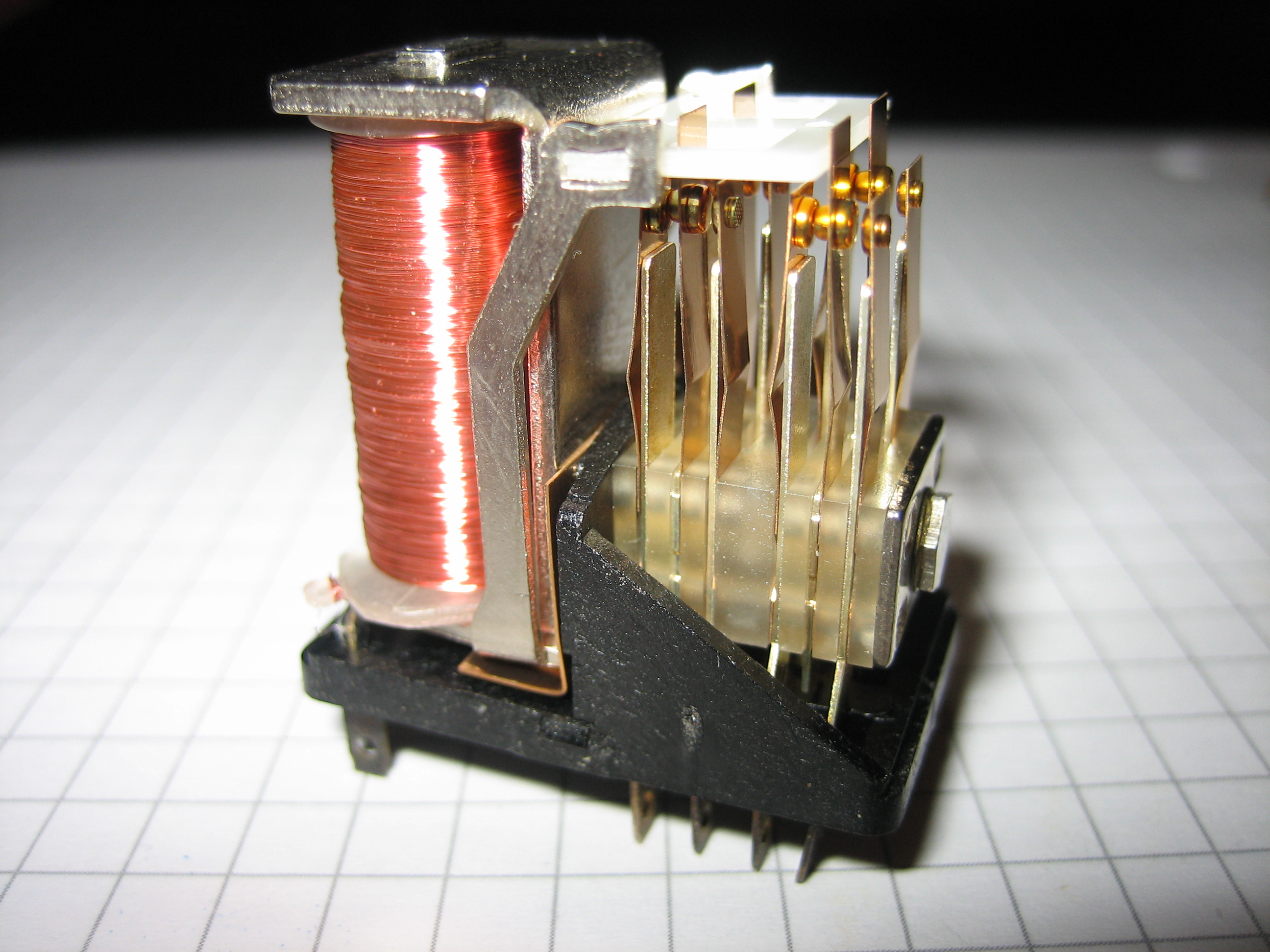 Offenes Relais